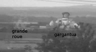 Mirapolis vue des hauteurs de Courdimanche, image coupée depuis Mirapolis.jpeg extraite d'une ancienne vidéo dont je suis l'auteur.